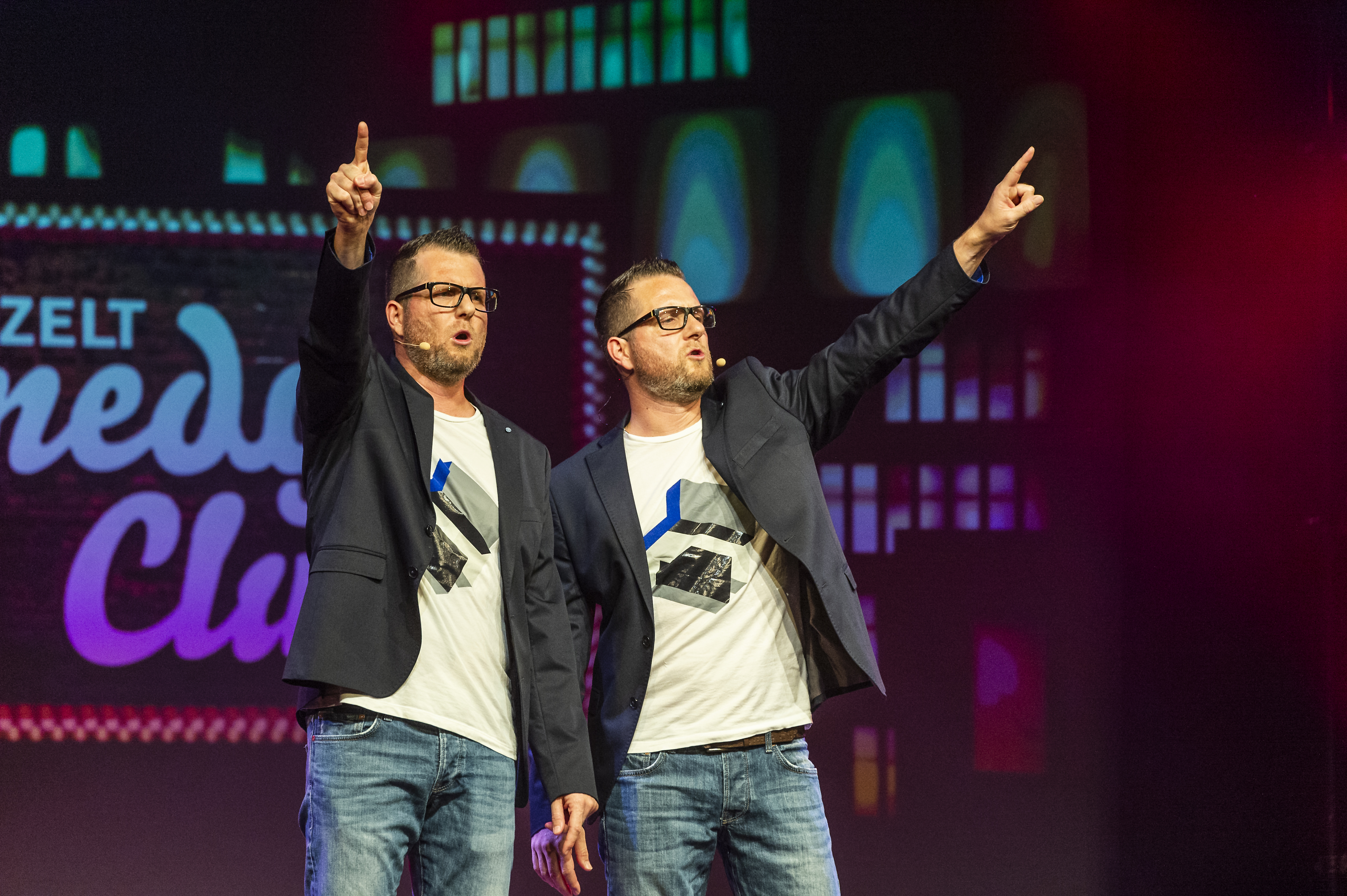 Das Comedy-Duo "Die Zwillinge" bei einem Auftritt.